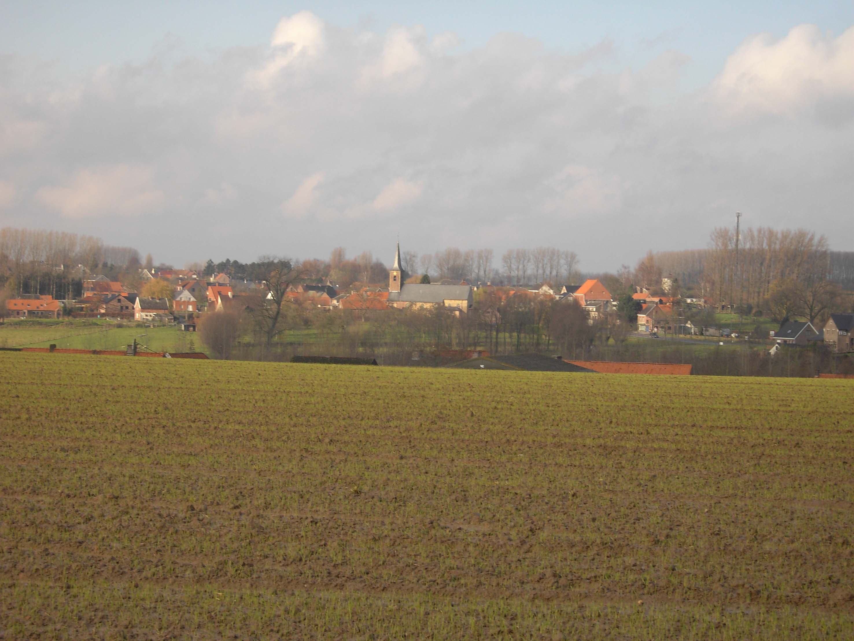 Hundelgem - Zwalm - Belgium - General view